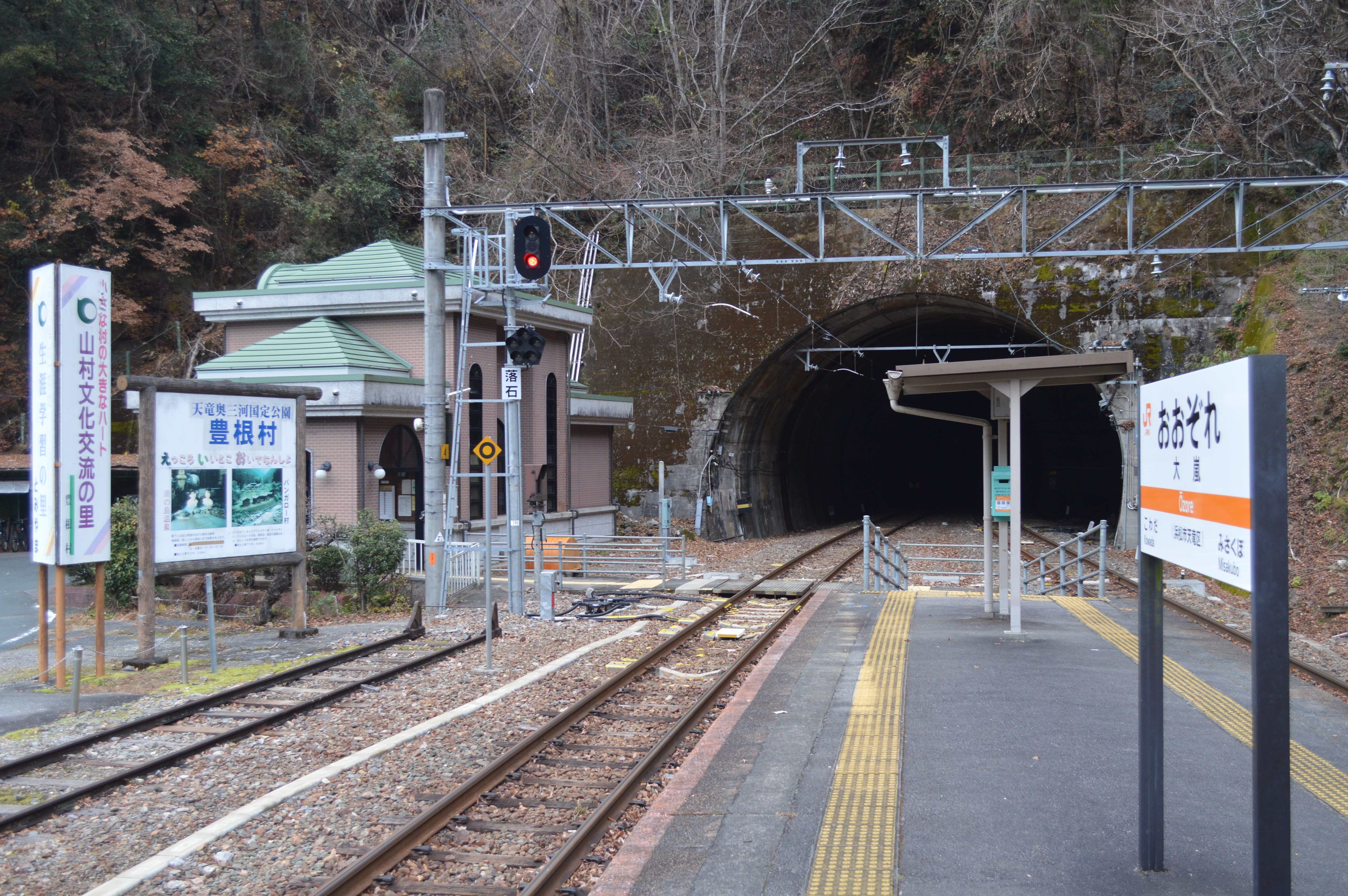 JR飯田線大嵐駅。静岡県浜松市天竜区。